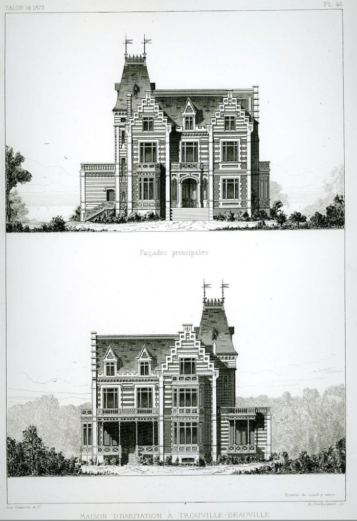 Elévation des façades principales de la Villa Griselidis à Deauville par Saintin, architecte, dans le Moniteur des Architectes (1873)